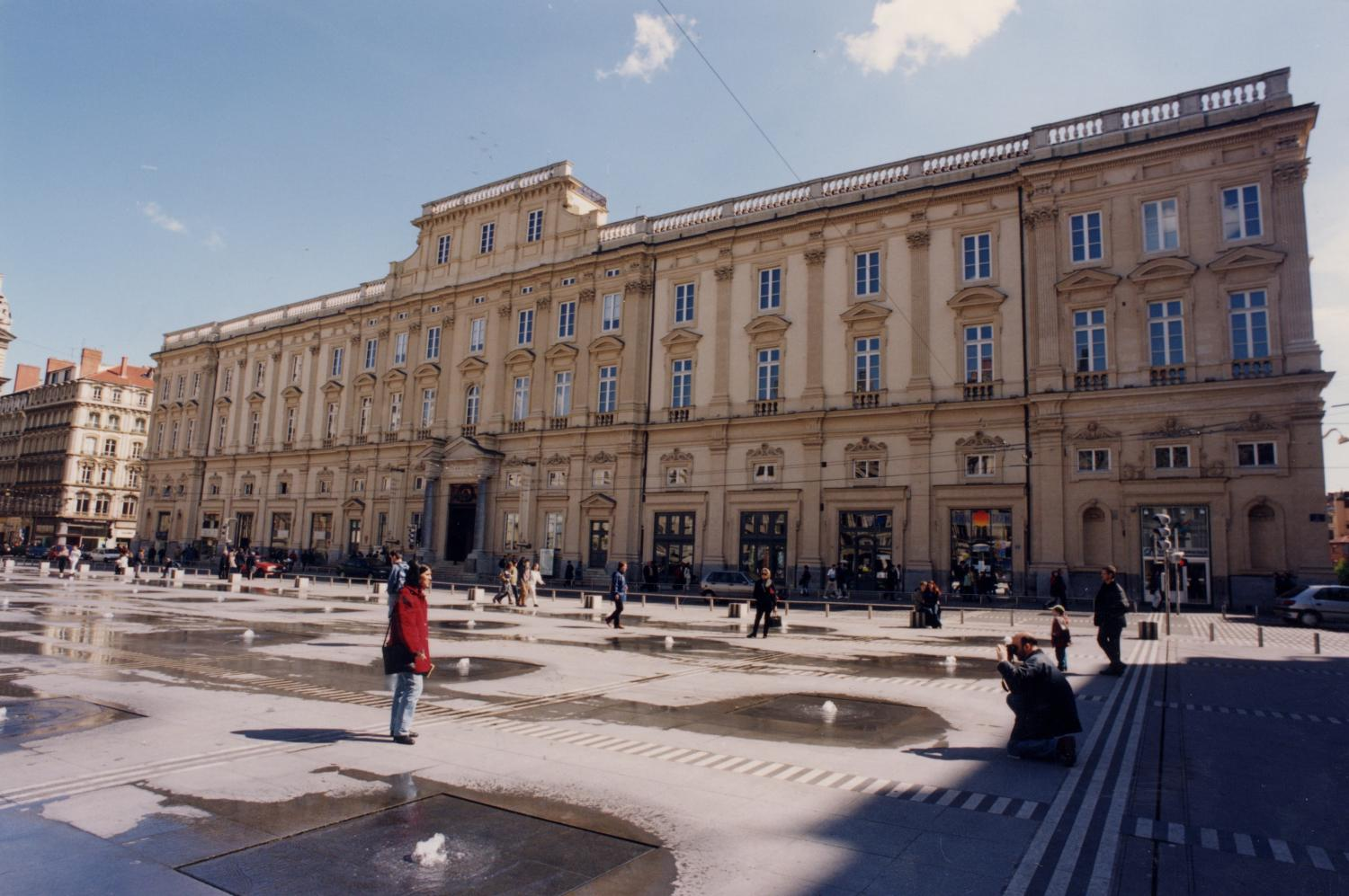 Musée des Beaux-Arts de Lyon, place des Terreaux